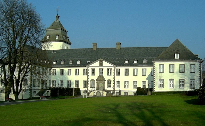 Kloster Grafschaft, Schmallenberg, Germany.